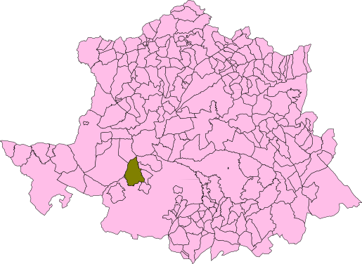 Arroyo de la Luz